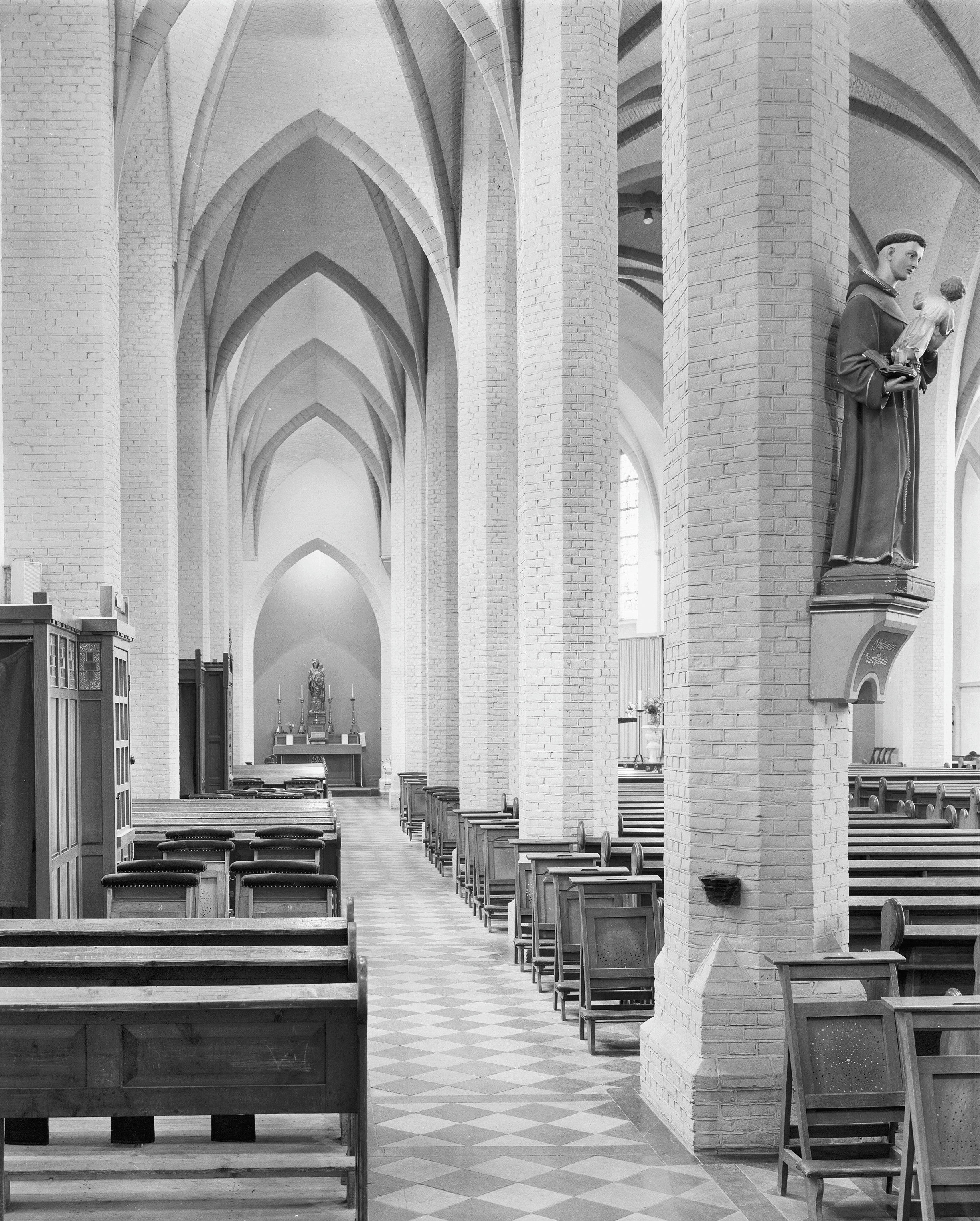 Rooms-Katholieke Sint Antonius Kerk: interieur zijbeuk naar het westen